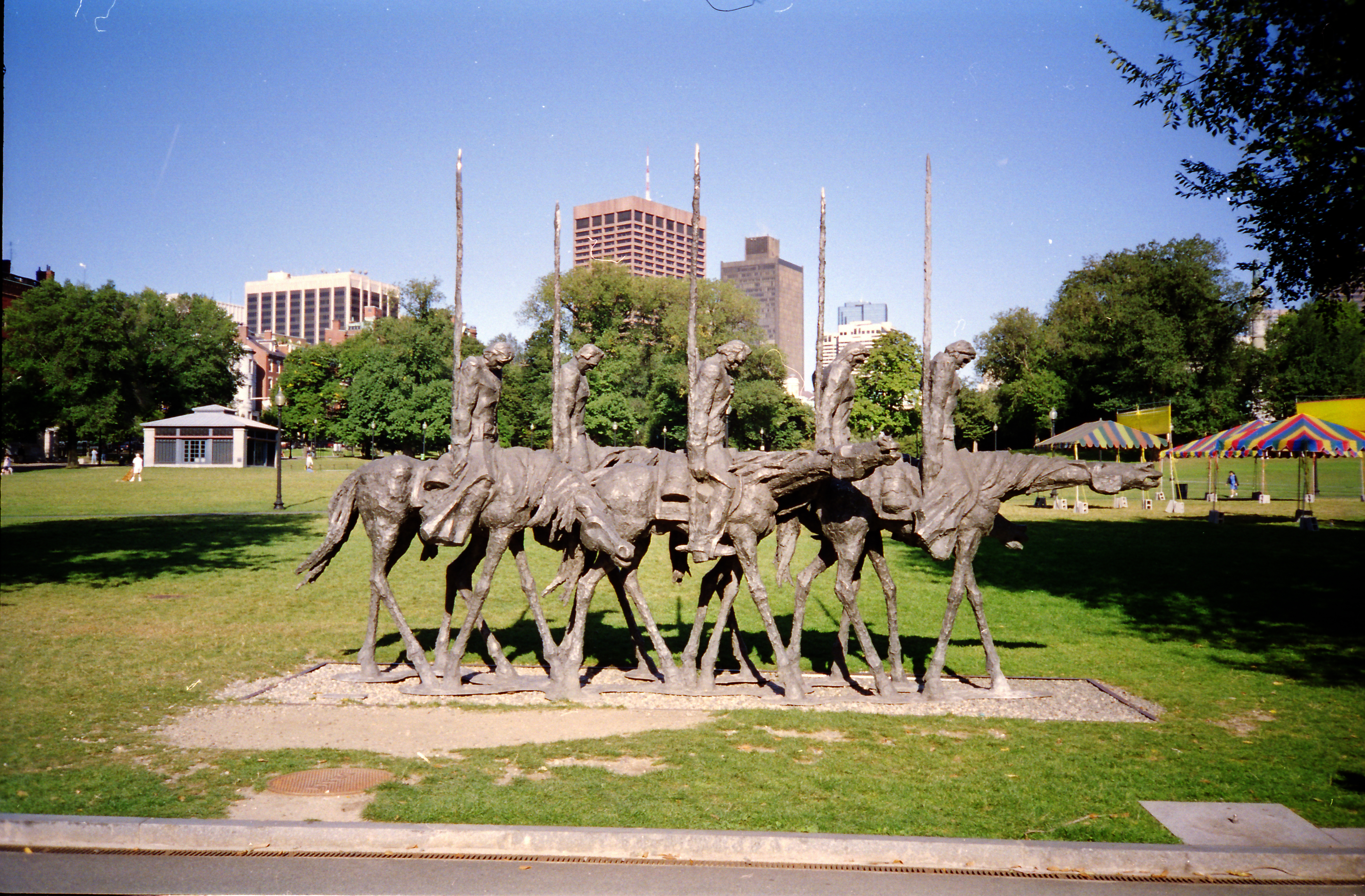 "Partisans" by Andrzej Pityński pictured in 1998.